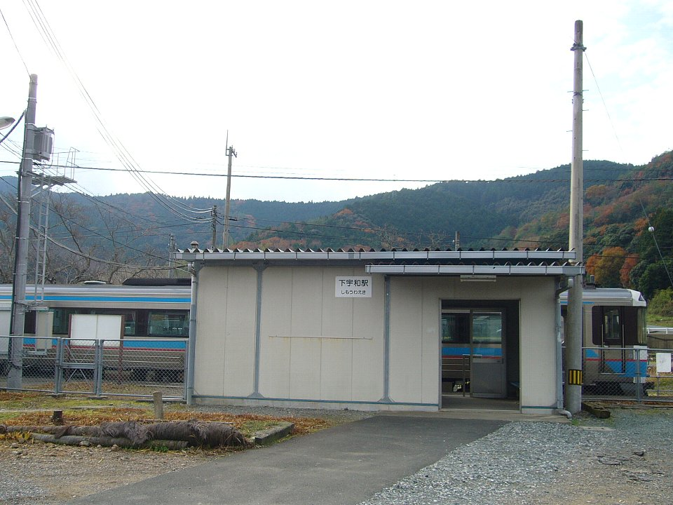 下宇和駅 キハ185が停車中